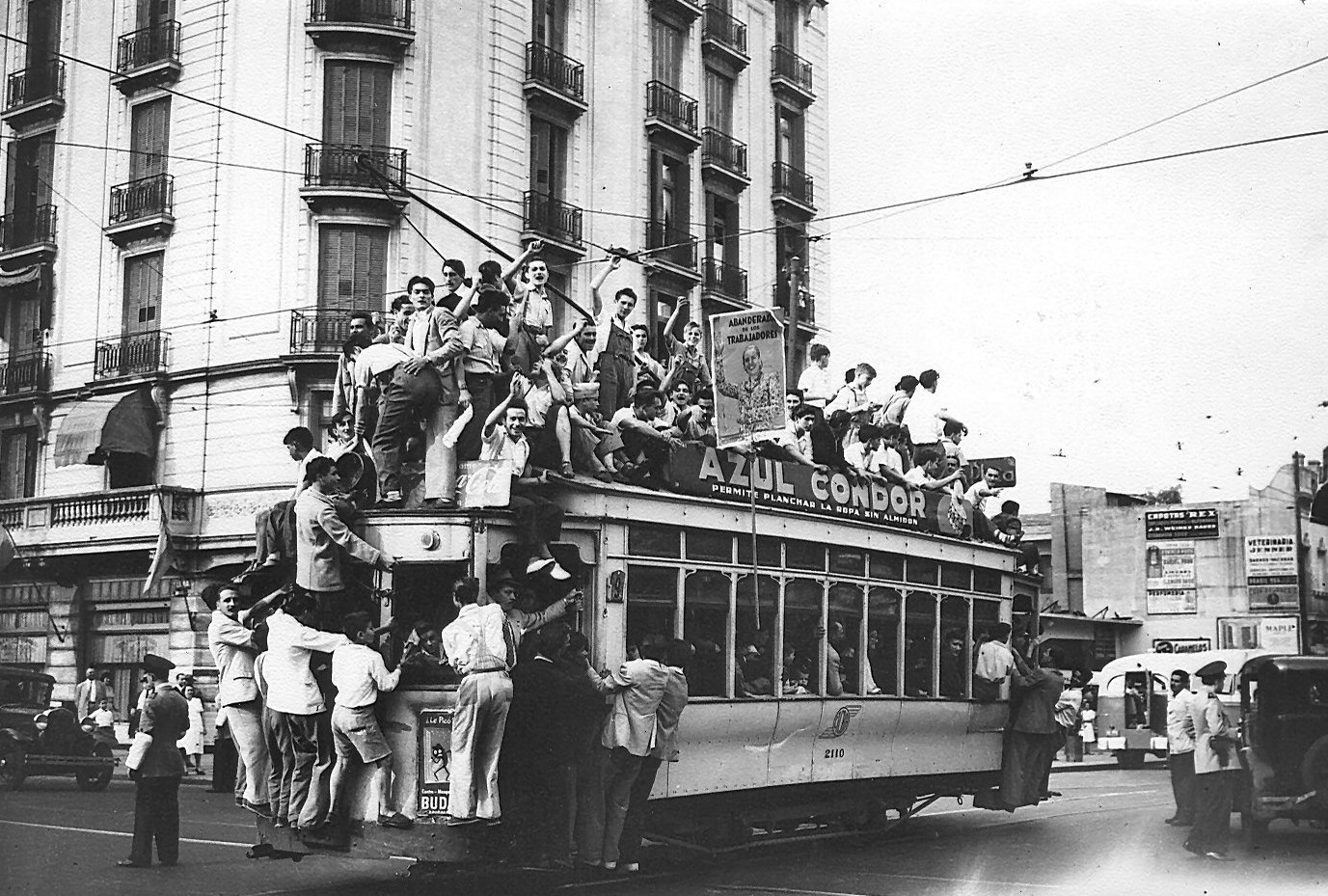 Tranvía repleto, durante los festejos del 17 de octubre en Buenos Aires.